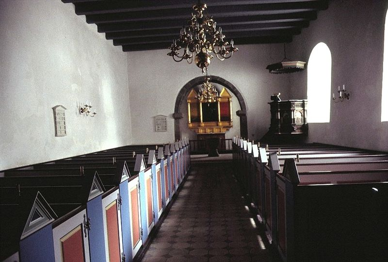 Dølby Kirke, kirkerummet set mod øst, Skive Kommune, Jylland, Denmark